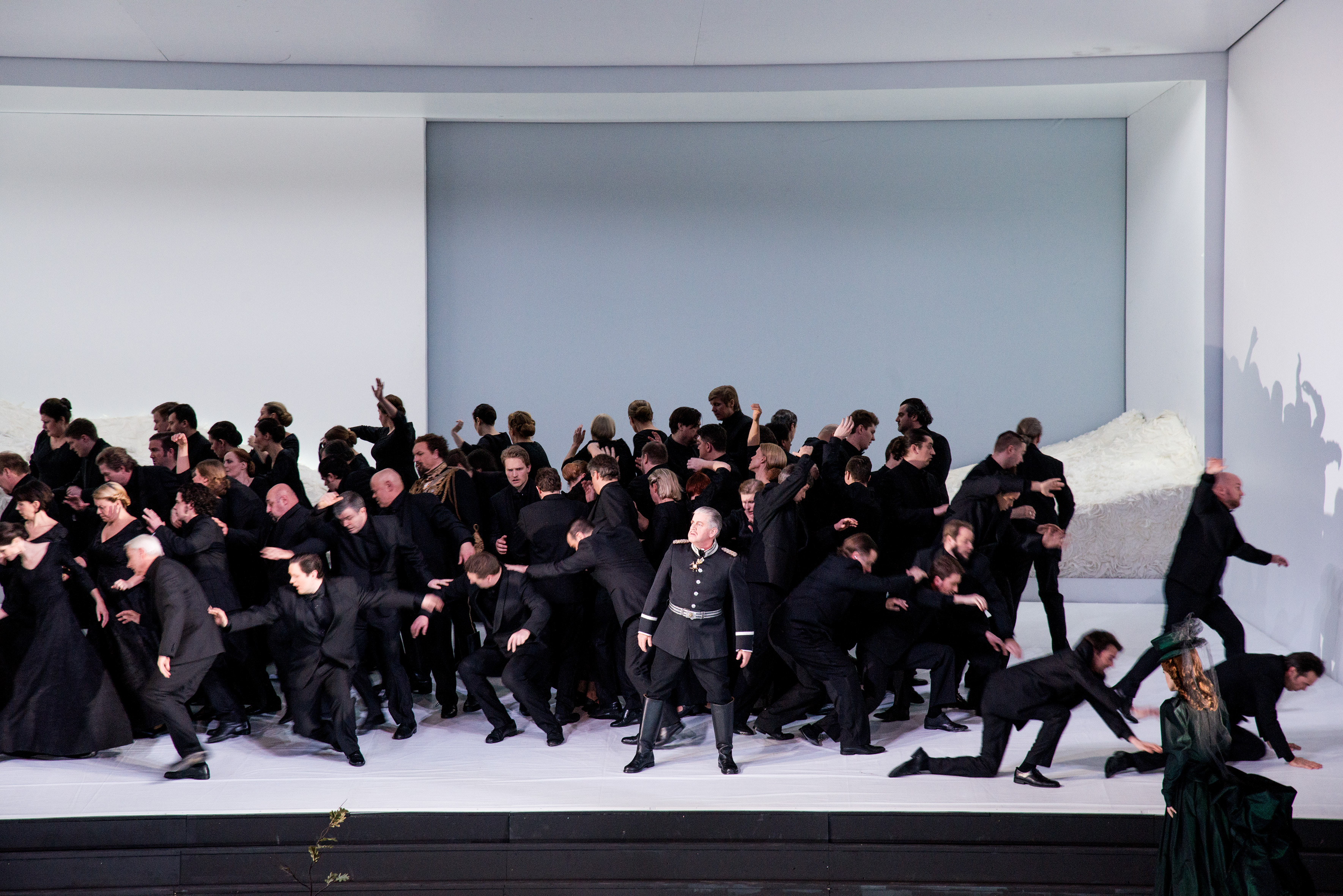 Lohengrin, Oper Oslo